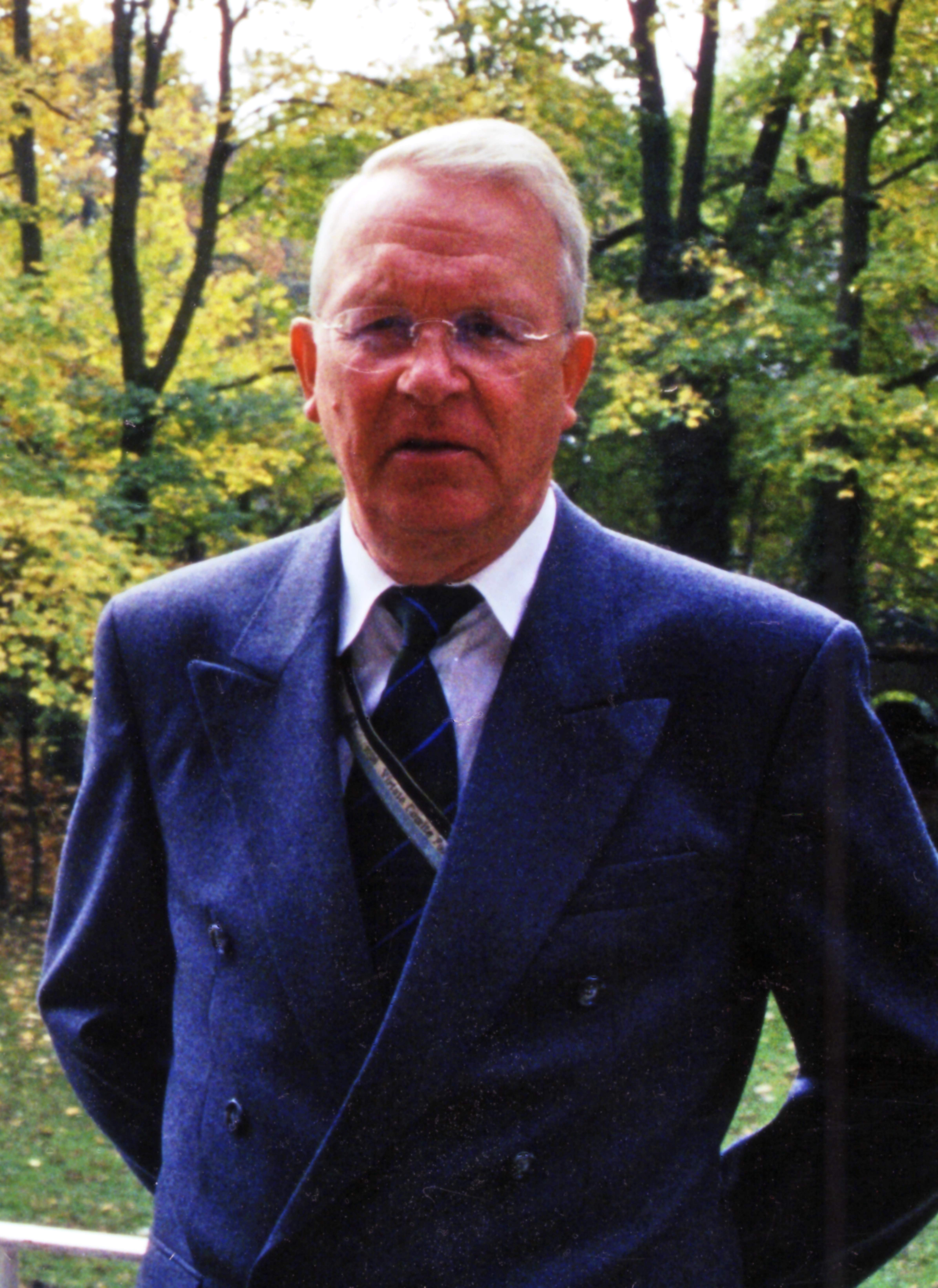 Fotografie des Forstmanns Peter Stoll